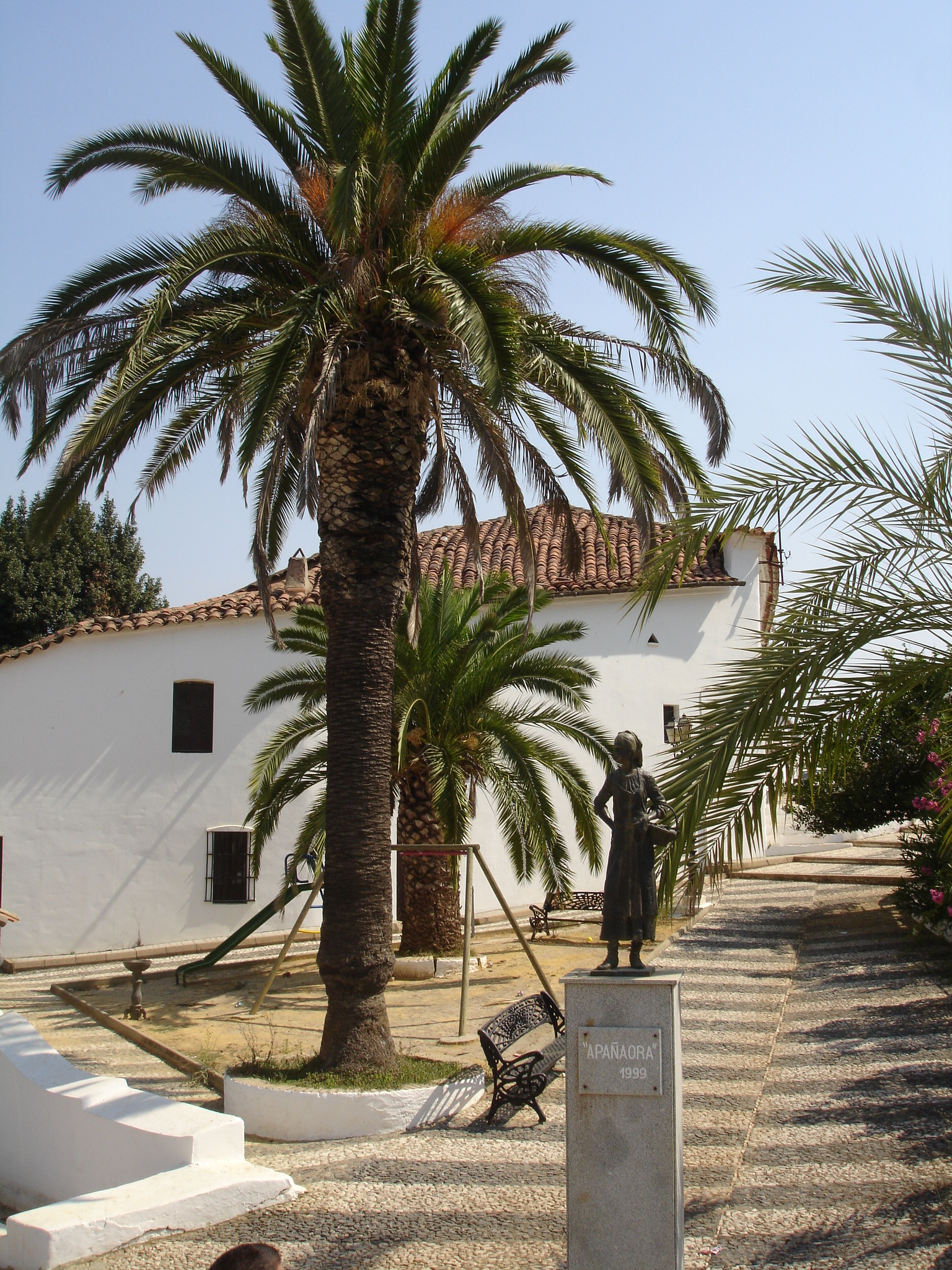 Estatua de la "Apañaora" en Los Marines (Huelva, España). Construida en 1999. Statue of "Apañaora" at Los Marines (Huelva, Spain). Built in 1999. Fotografía por comakut.